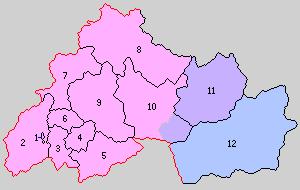 奈良県宇陀郡の町村制時点の町村。